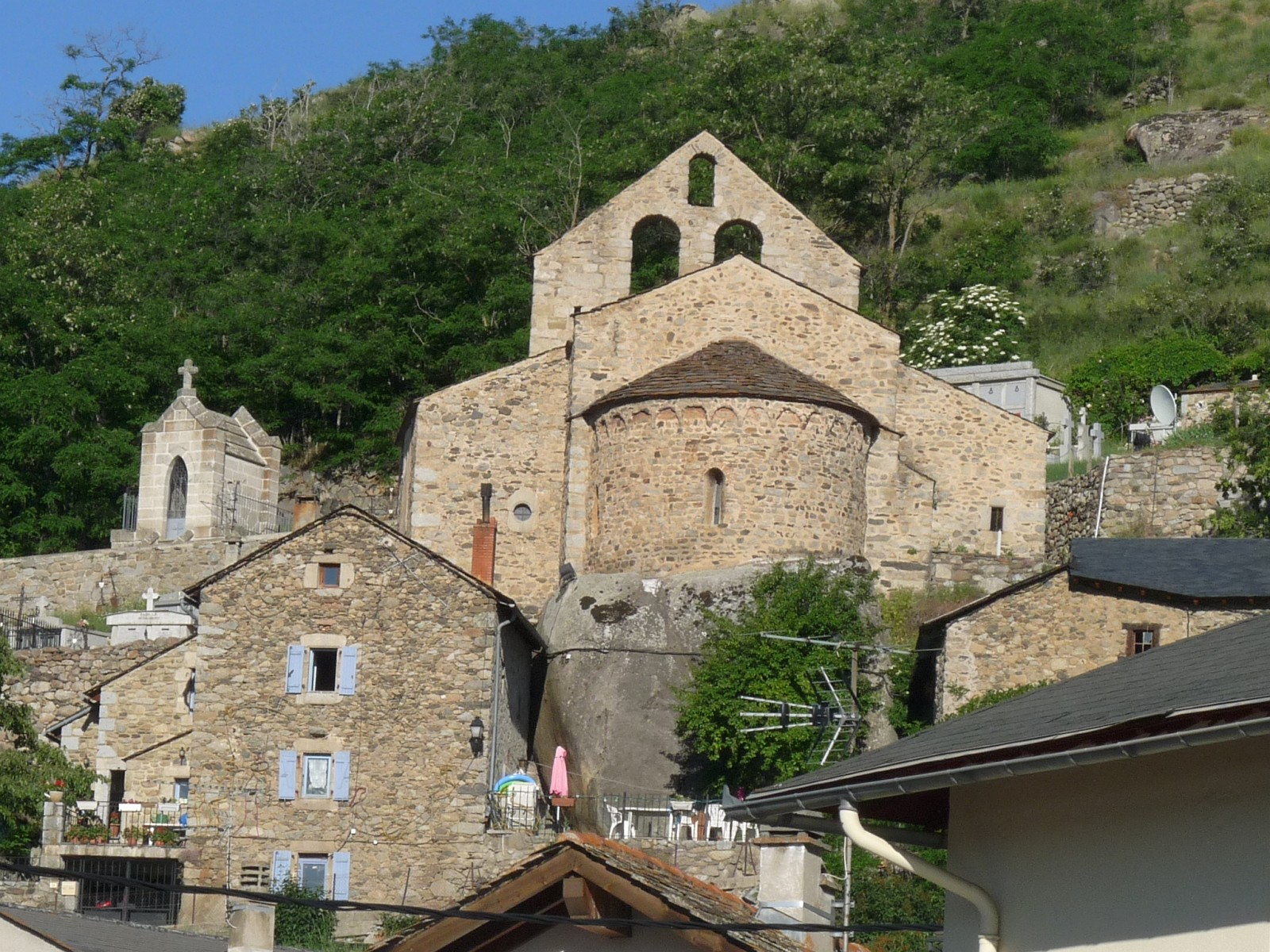 Ancienne église St-André, Angoustrine, P.O., France